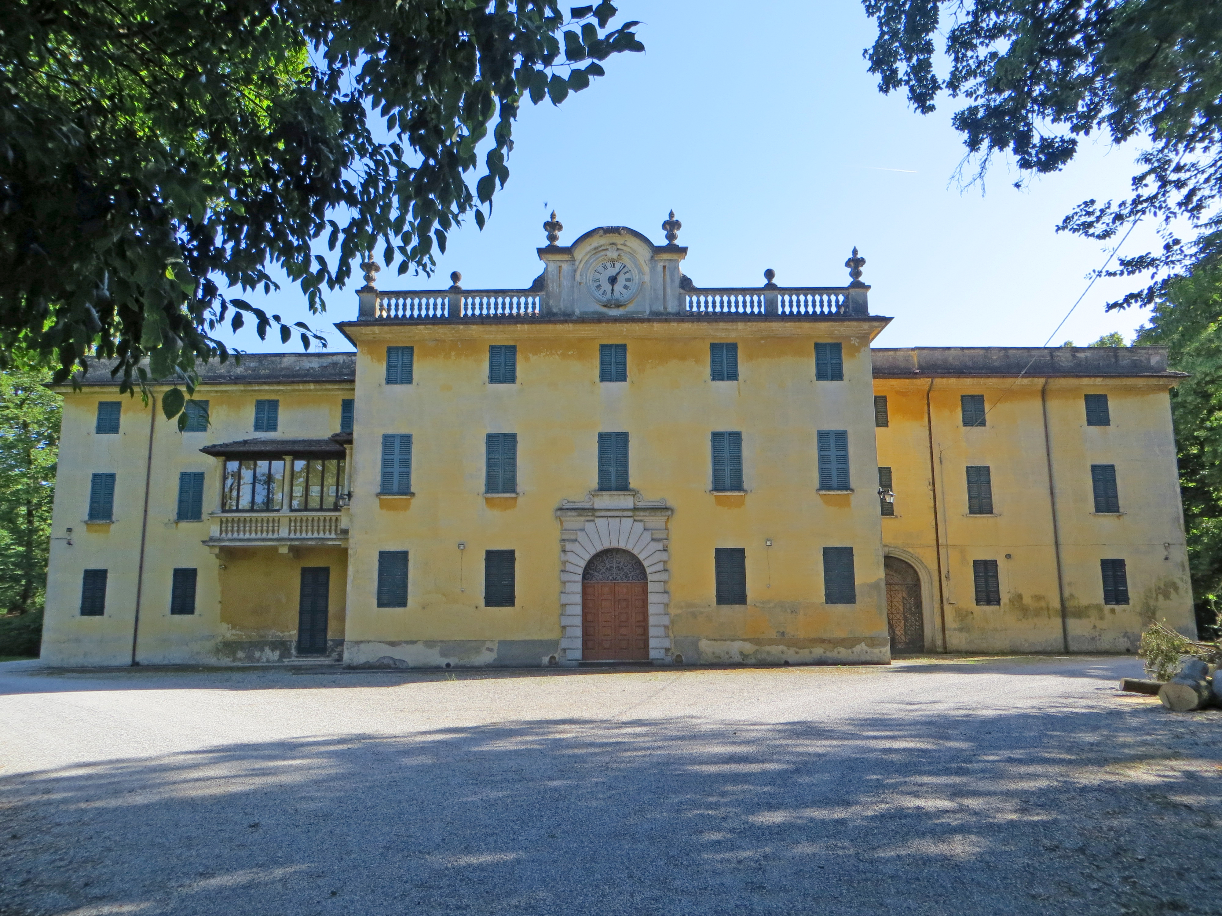 Villa Balduino Serra (Gainago, Torrile) - facciata